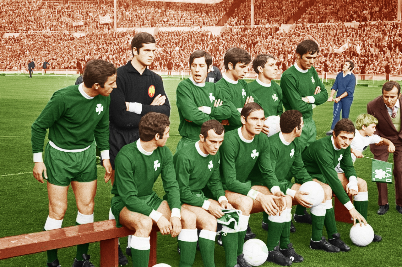 Elftal van Panathinaikos (colour edit by user Sportingn